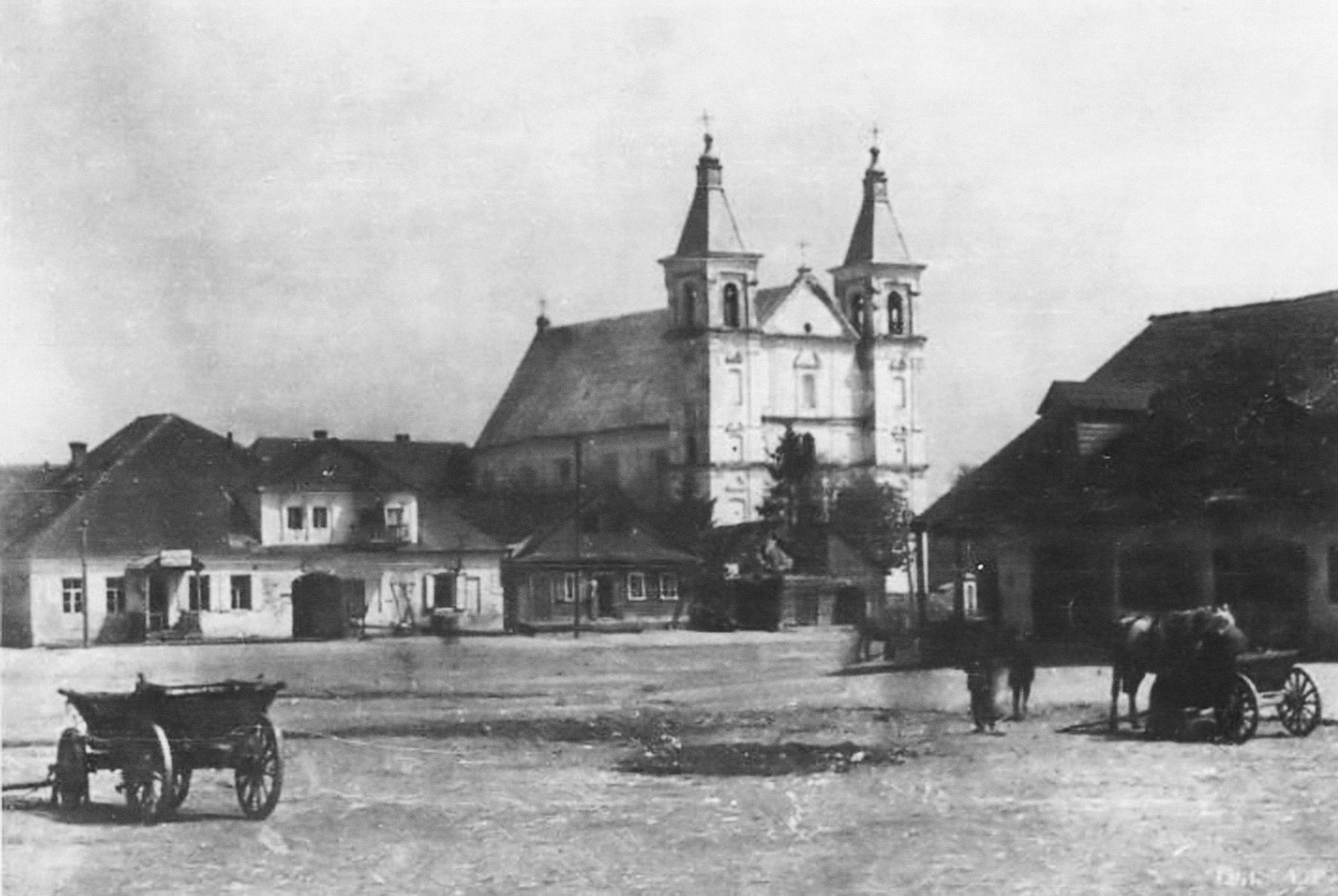 Клецк. Забудова галоўнай плошчы. 1930-яБеларуская (тарашкевіца): Клецак (Klecak), пляц Рынак (plac Rynak)